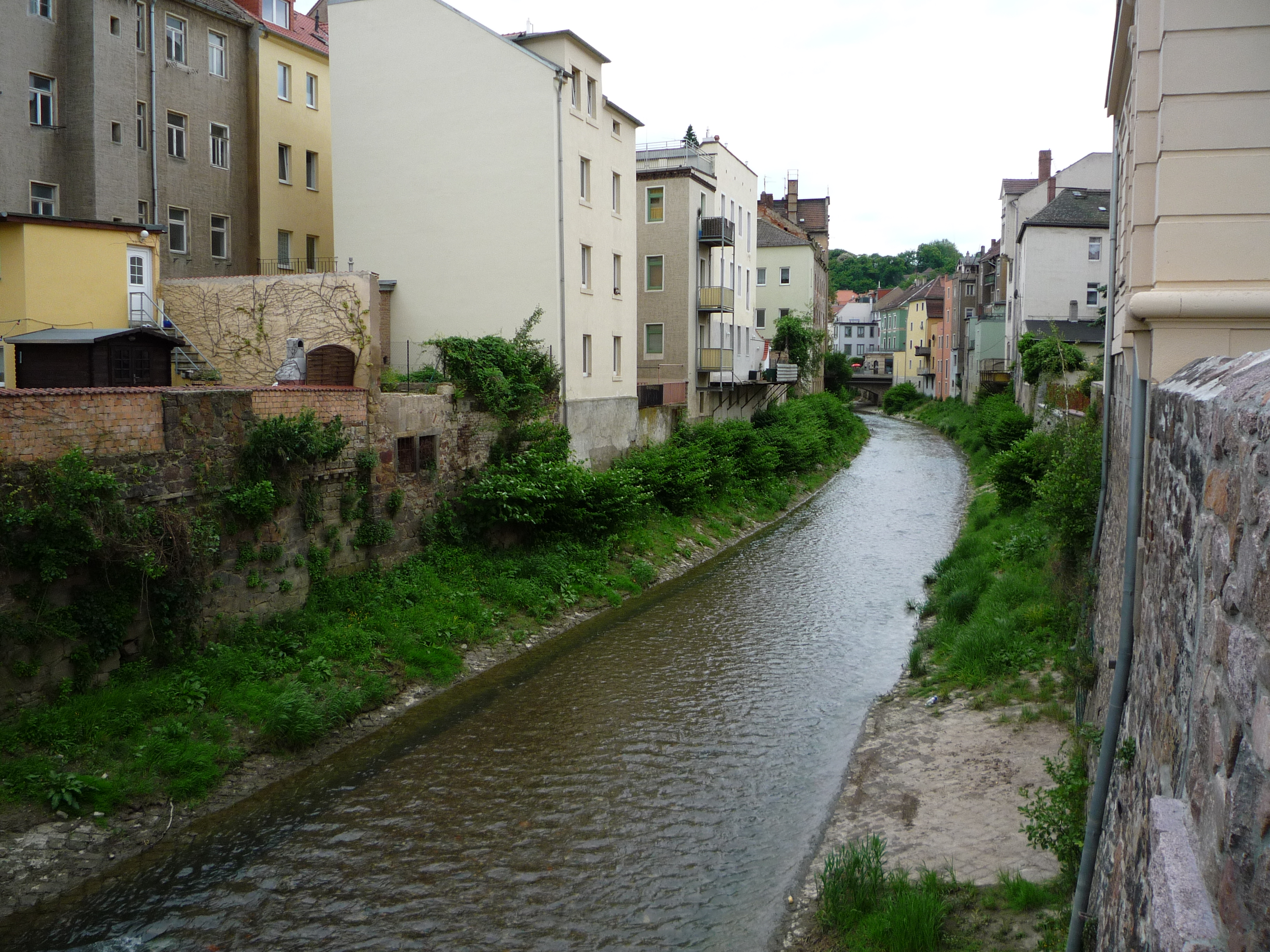 Der Fluss Triebisch in Meißen.